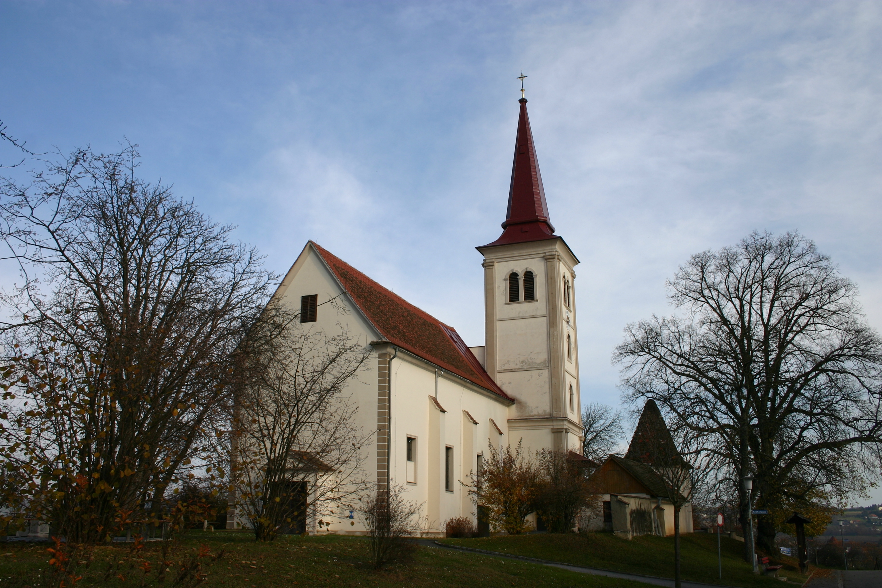 Burgau römisch-katholische Pfarrkirche